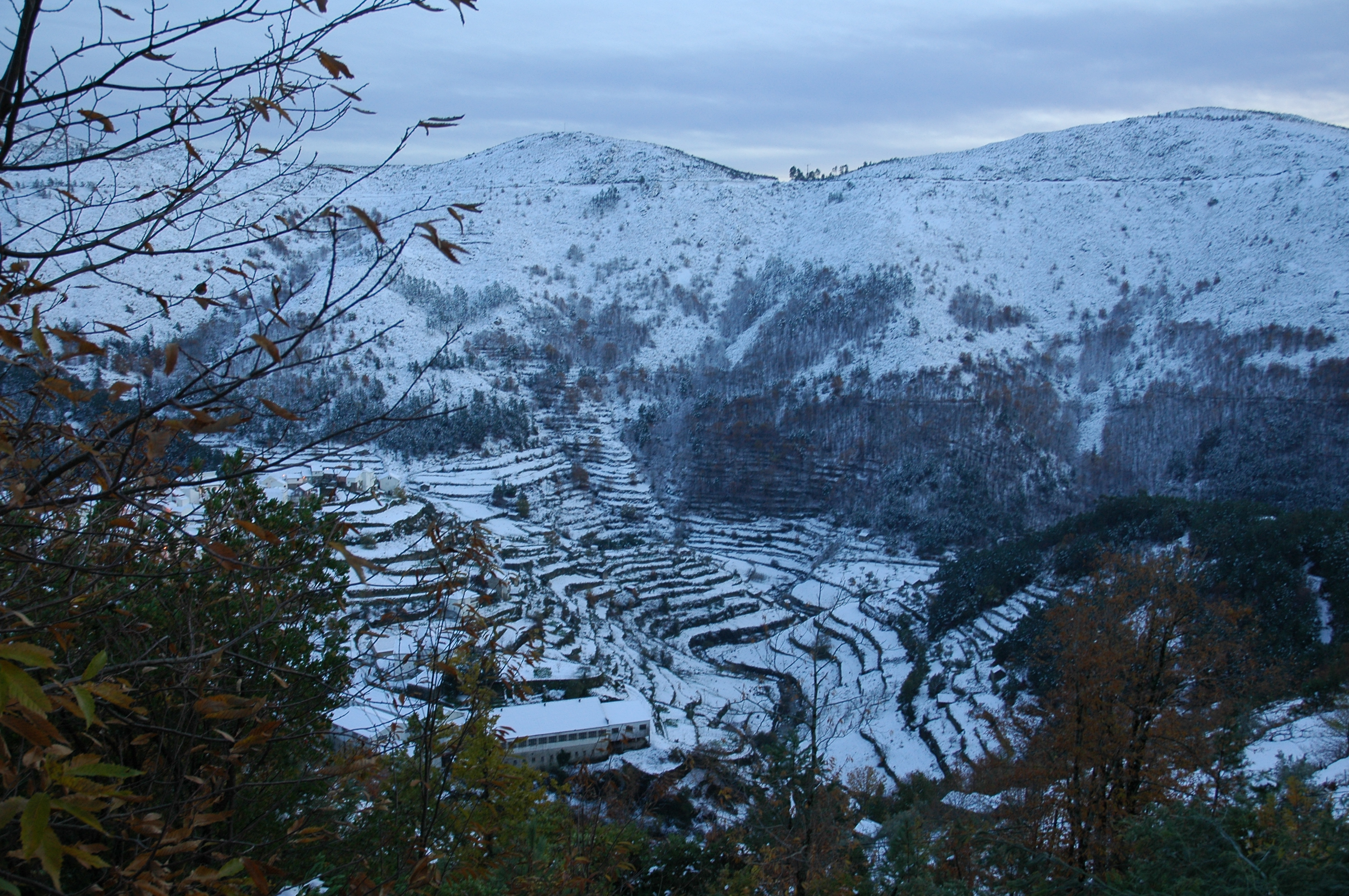 Socalcos de Loriga sob manto de neve. This is a photography of a Site of Community Importance in Portugal with the ID: PTCON0014. Natura2000 entry, EEA entry